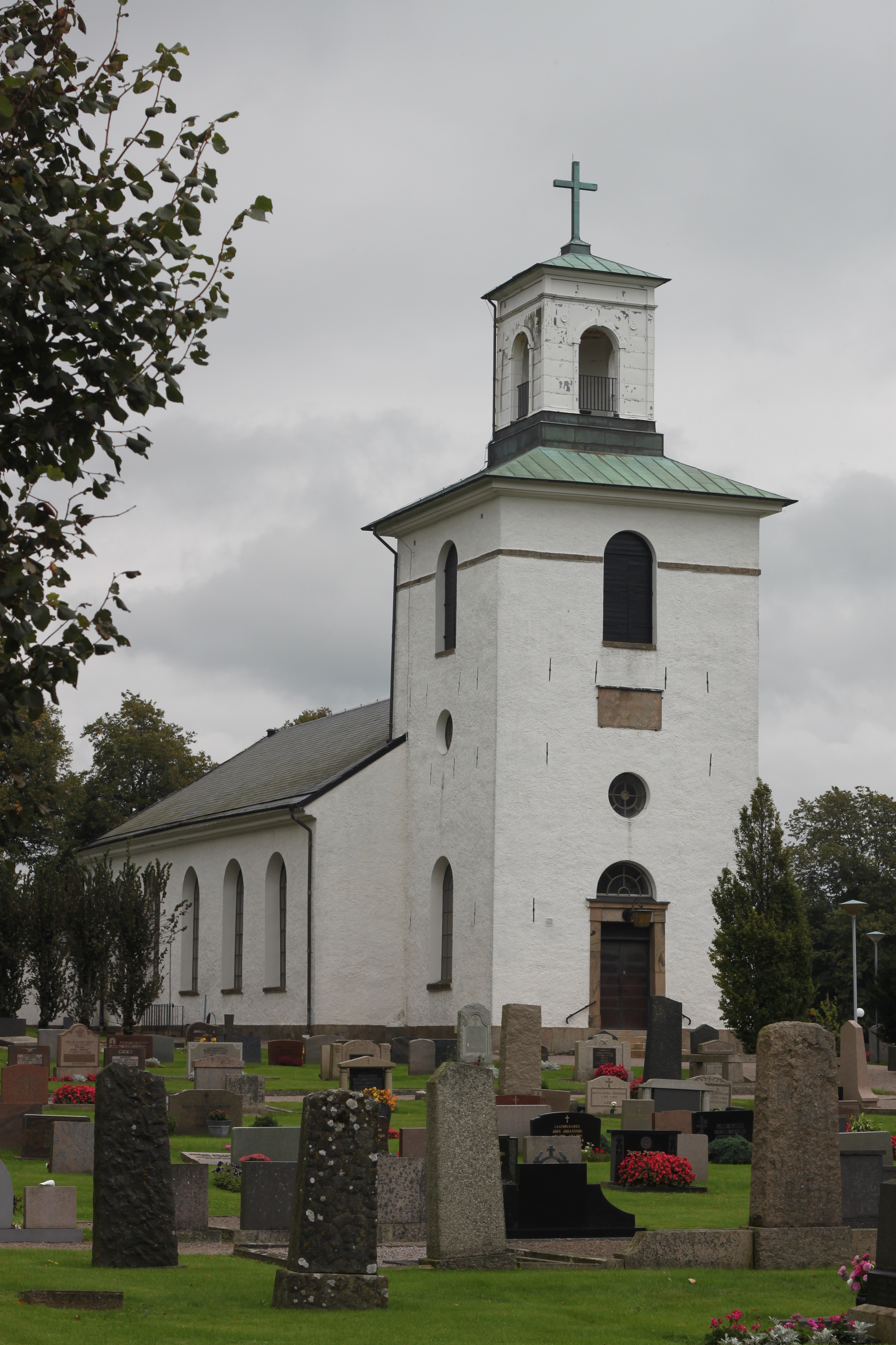 Slöinge kyrka